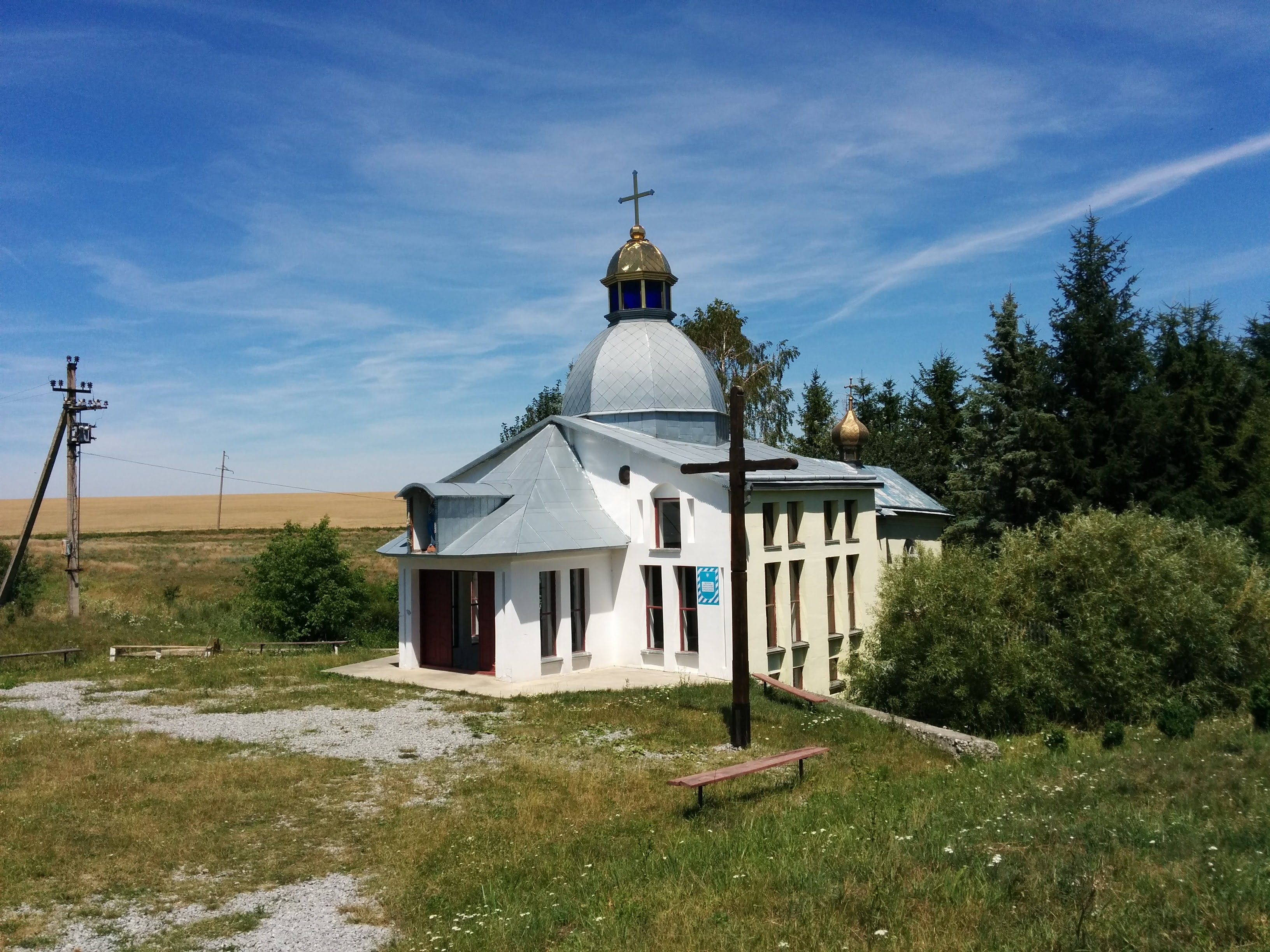 «Сороцьке джерело», Теребовлянський район, с. Сороцьке